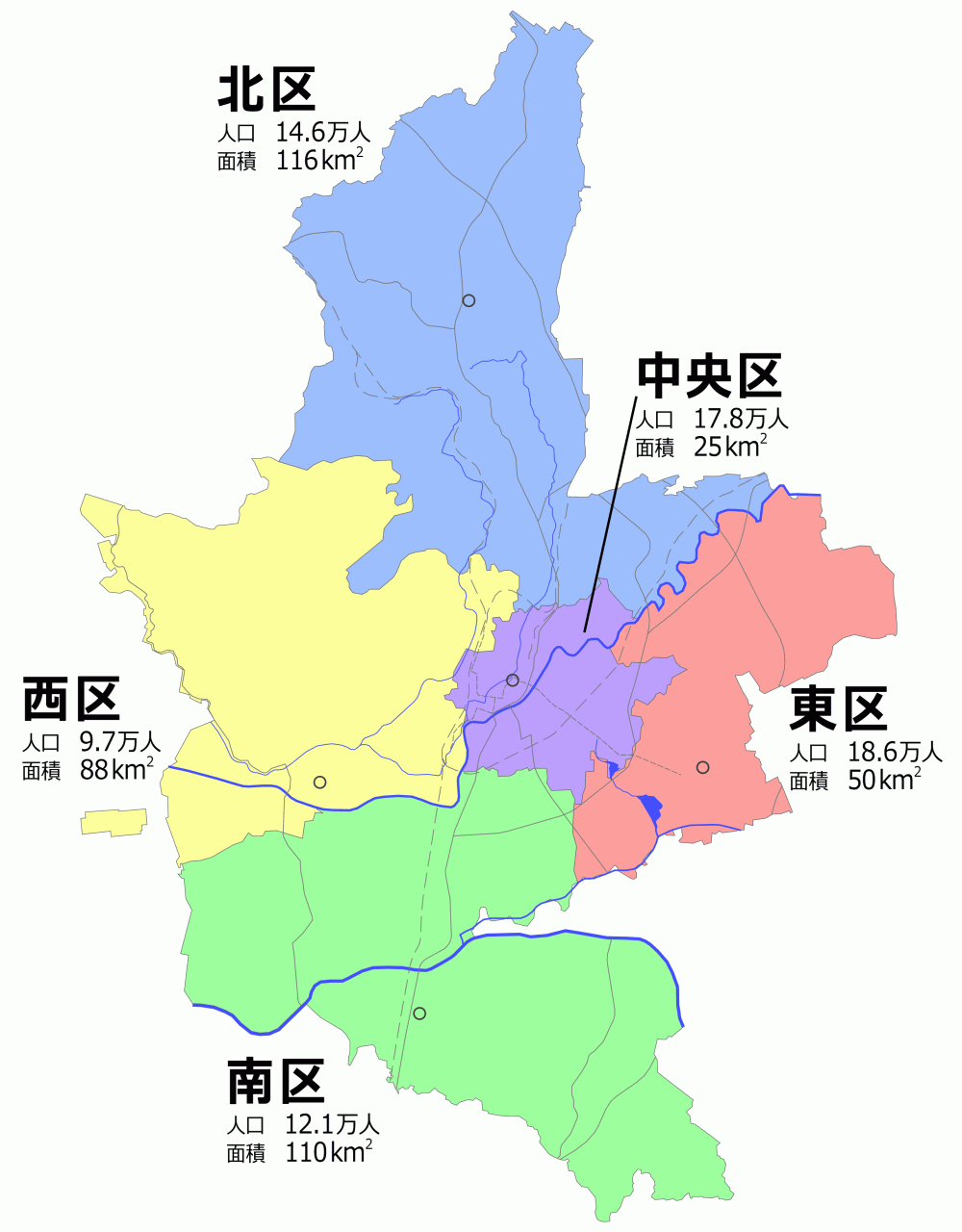 2012年に政令指定都市へ移行する見込み(まだ確定はしていない)の熊本市の区。区名は熊本市行政区画等審議会が市長に答申した名称により、熊本市政令指定都市推進本部会議が決定した(これもまだ確定ではない)。